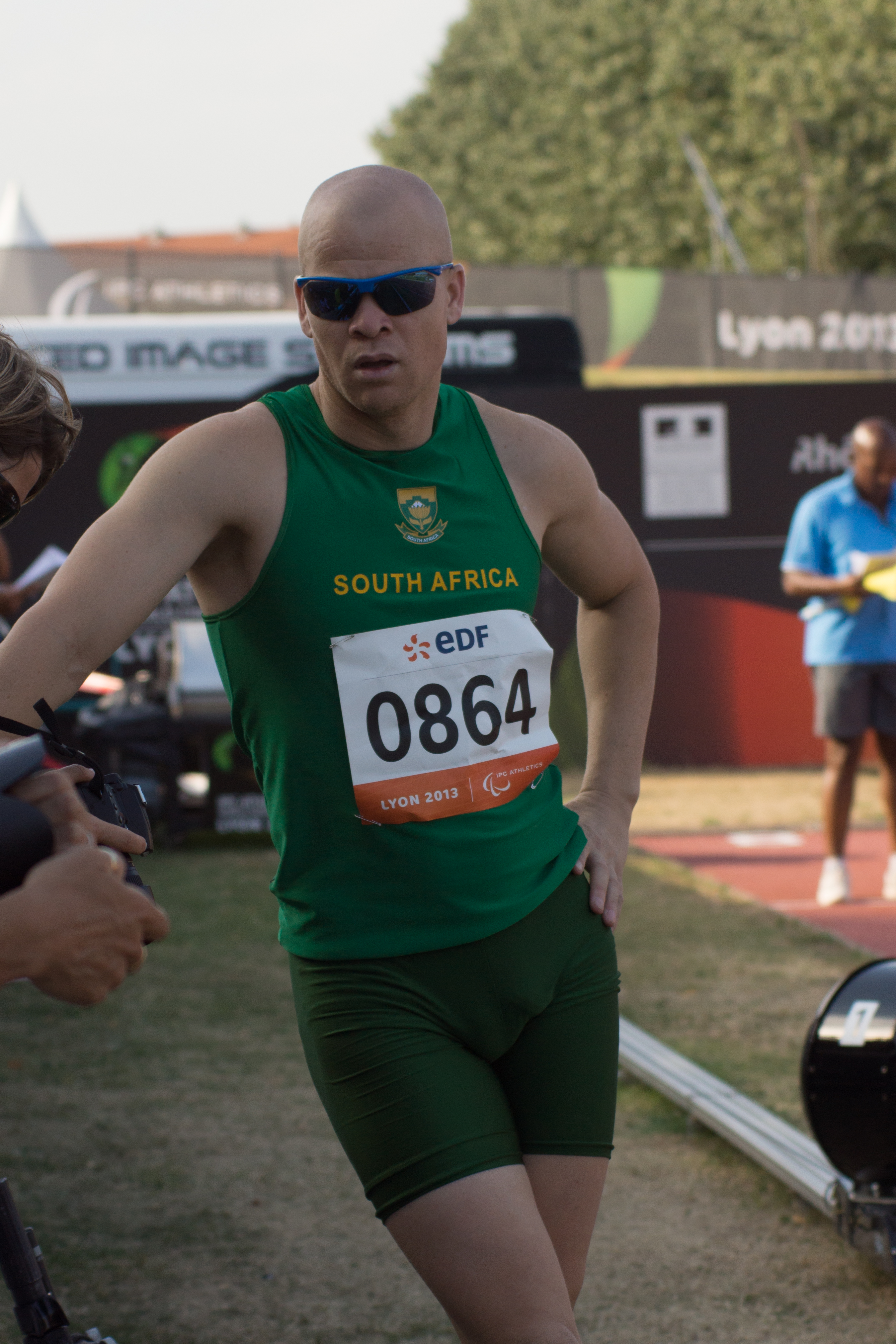 Championnats du monde d'athlétisme handisport 2013. Saut en longueur masculin T12.